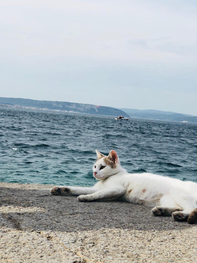 قطة على شاطئ مدينة جناق قلعة في تركيا